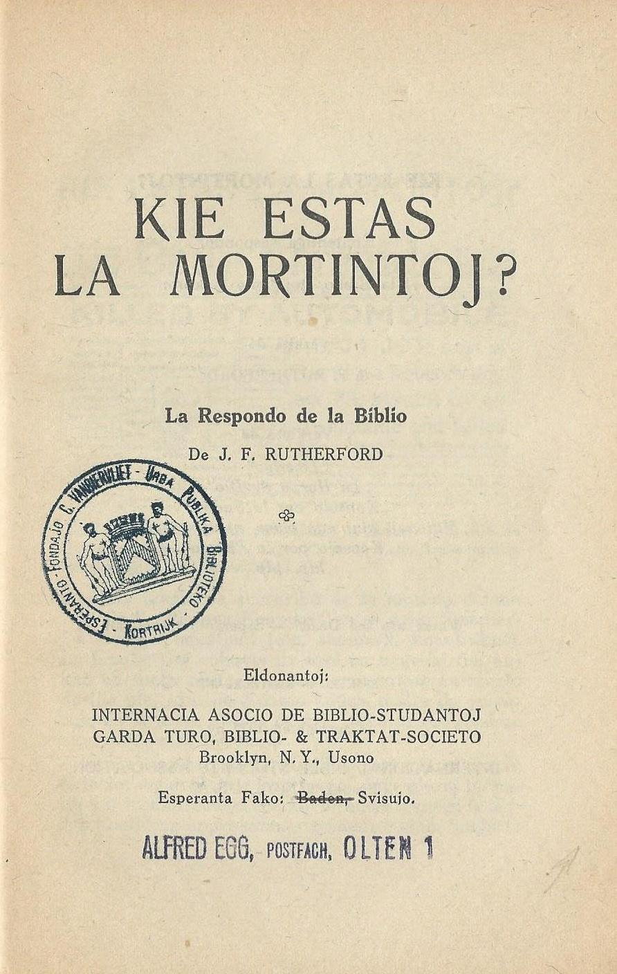 librokovrilo de "Kie Estas la Mortintoj", 1927